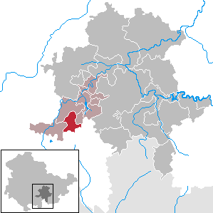 Cursdorf in Thuringia - District Saalfeld-Rudolstadt